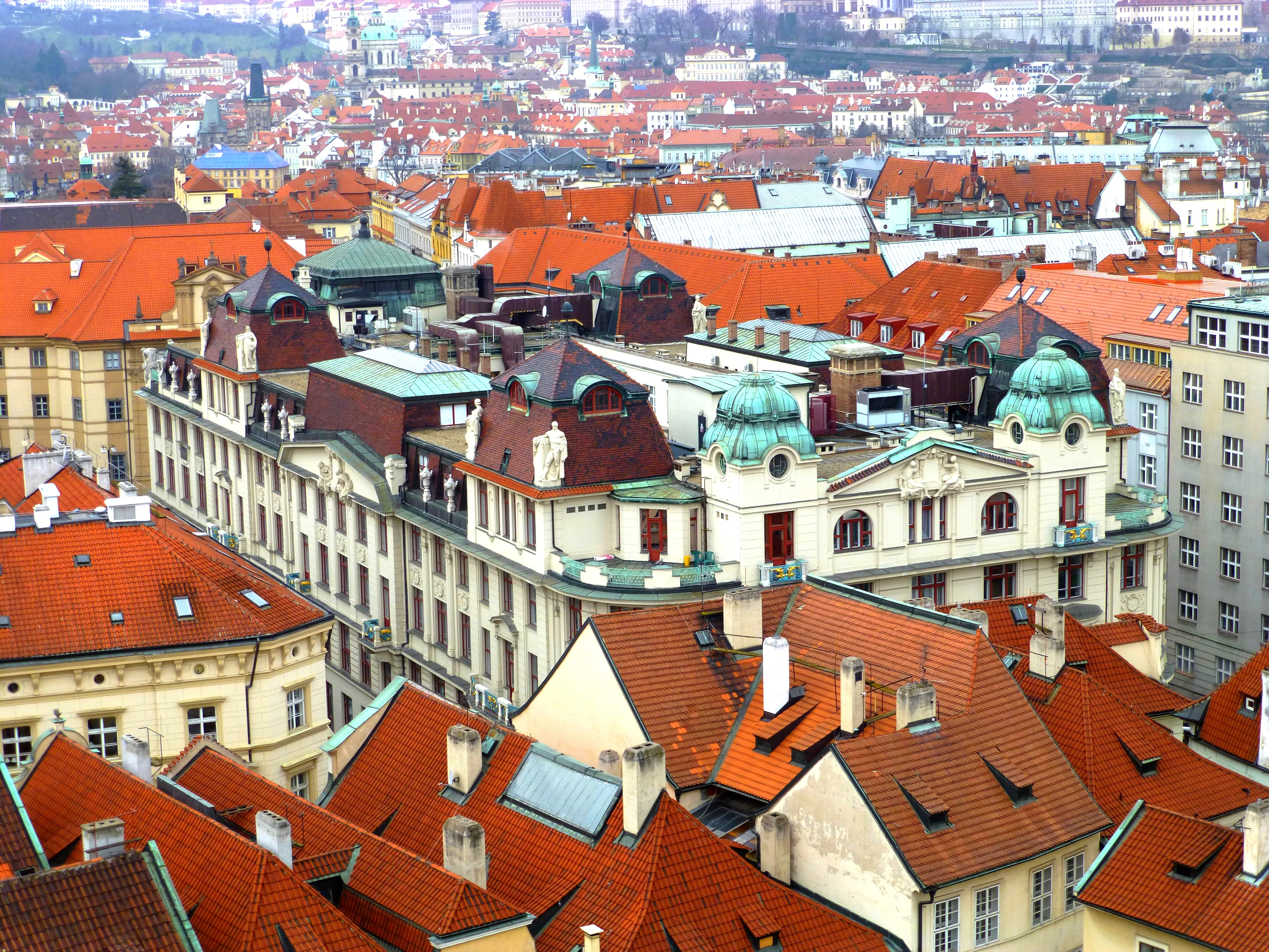 Prag - Blick vom Altstädter Rathausturm auf das Neue Rathaus - Pohled z věže Staré radnice v Nové radnici